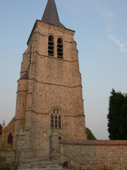 Eglise de Lewarde S.Majerowicz 2006